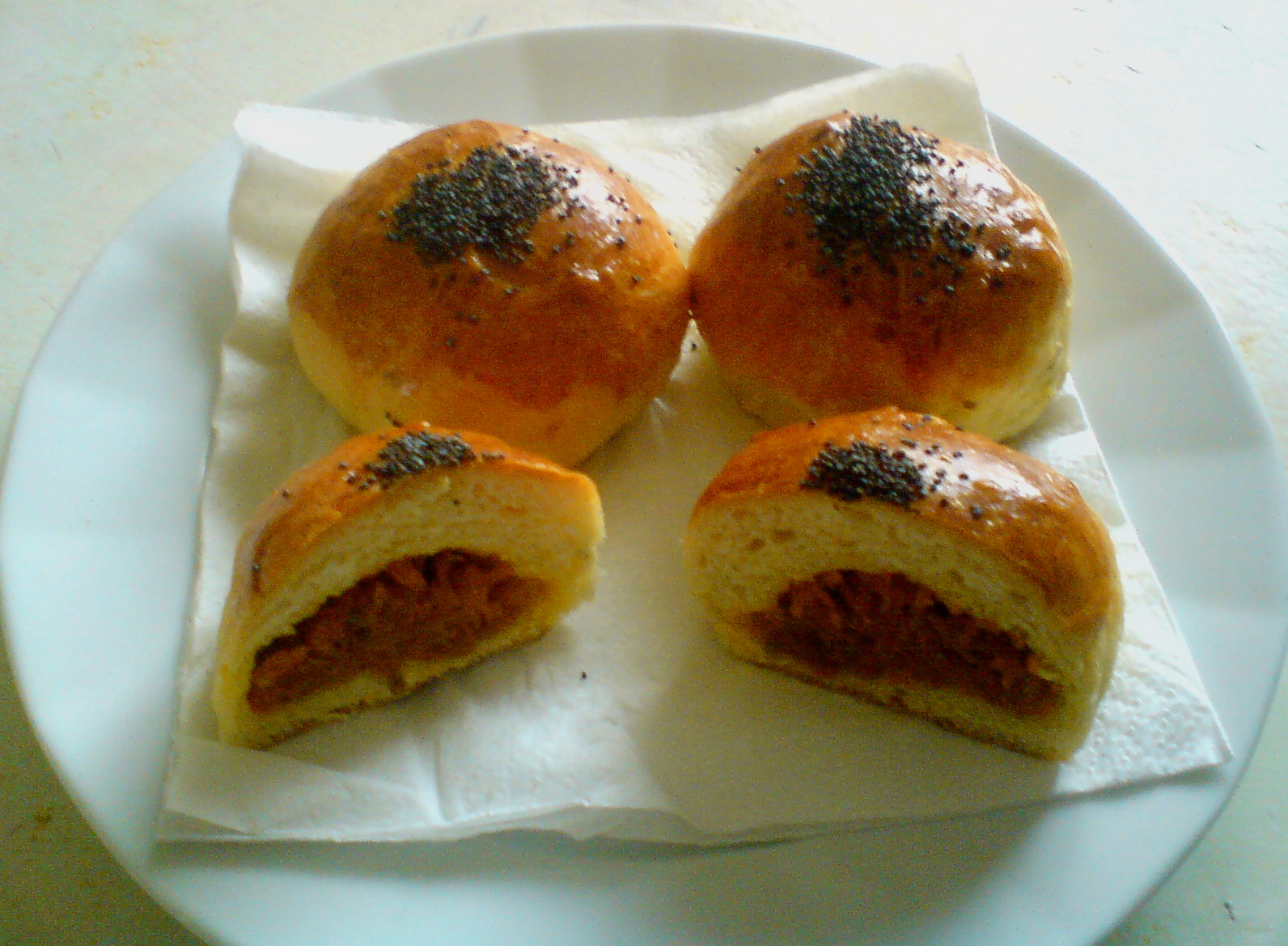 Mrkvance - buchty s mrkvovou náplní.